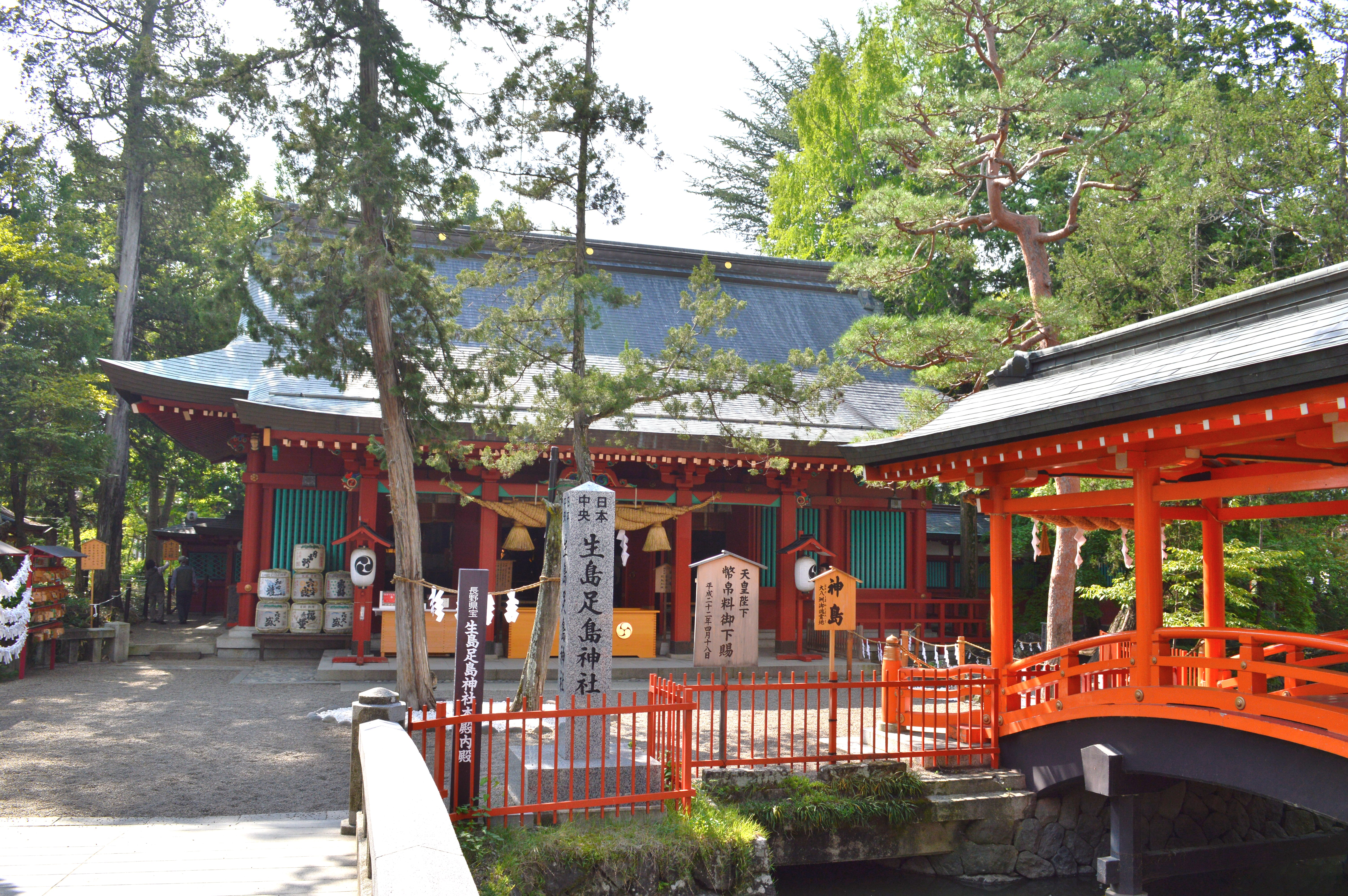 生島足島神社 境内